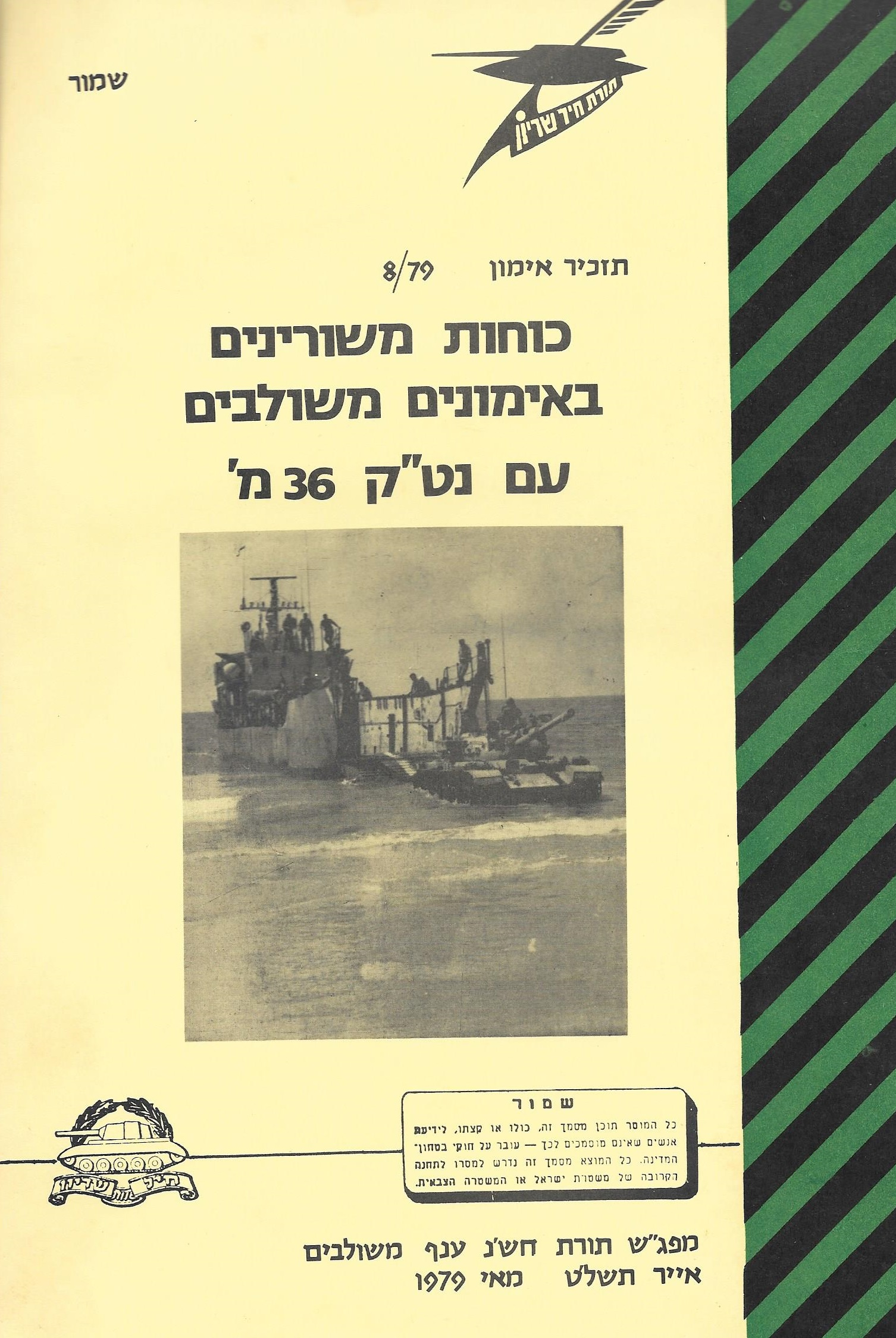 דף הכריכה של חוברת אימוני חיל שירון בנחתת 36 מ'